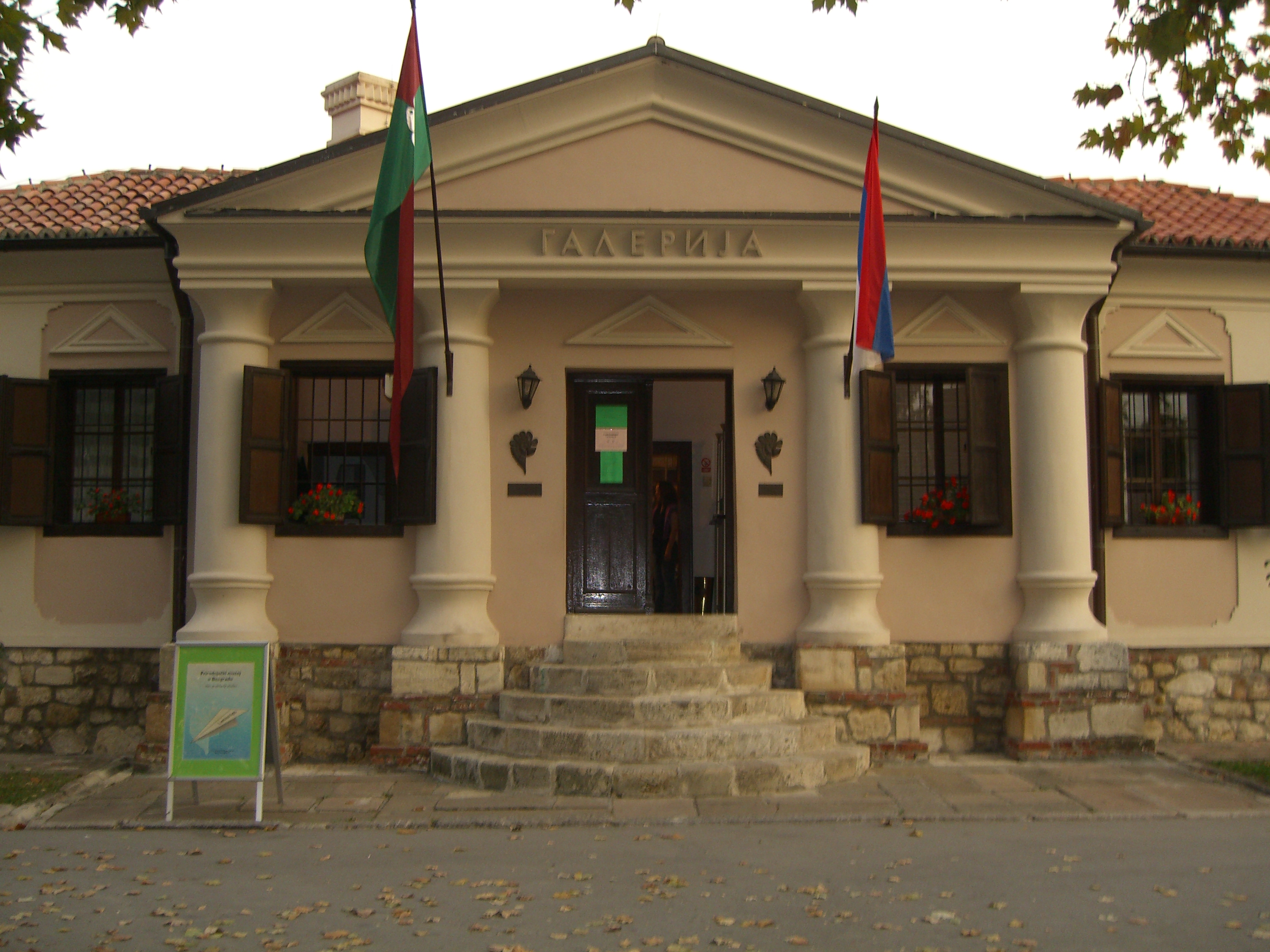 Galery (Kalemegdan, Belgrade) - Galerija (Kalemegdan, Beograd)